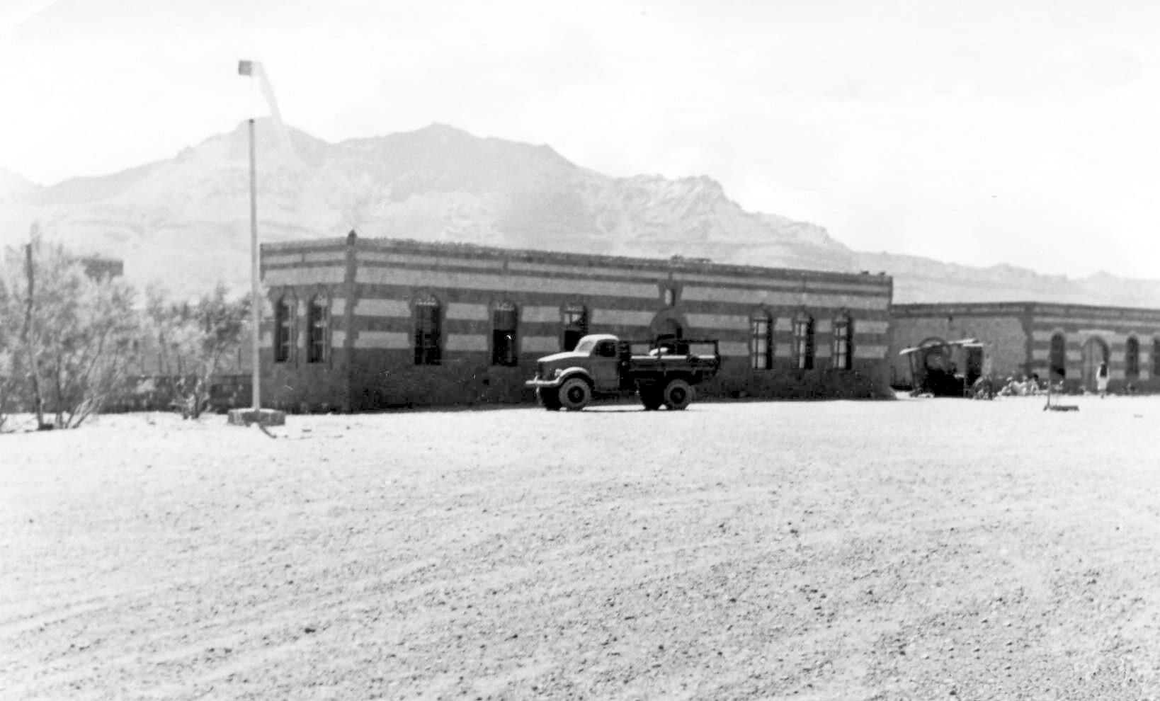 Airport Sanaà